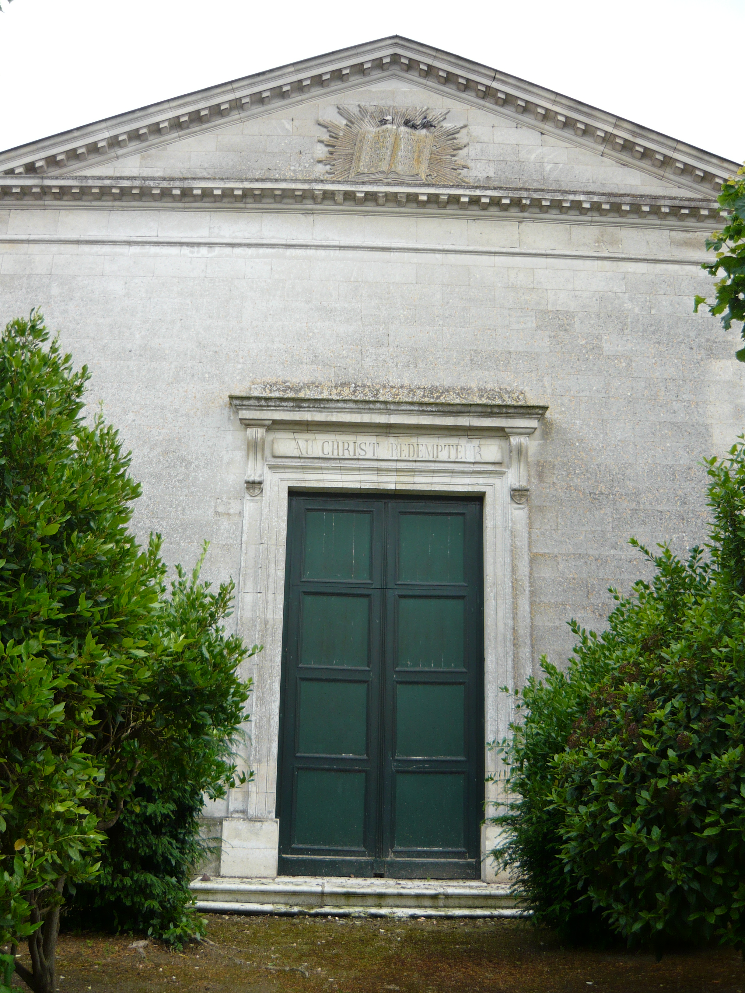 Le Temple protestant de Gémozac (17)